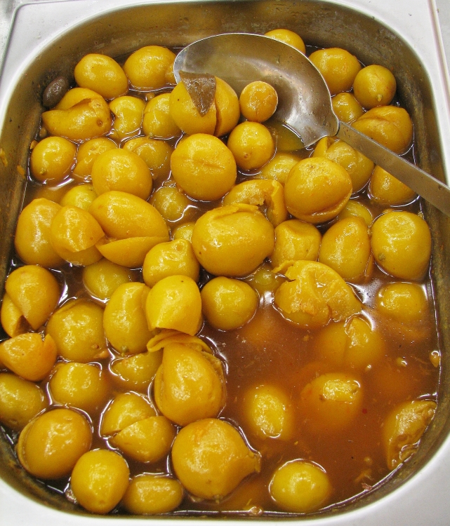 Small pickled lemons - a Moroccan delicacy